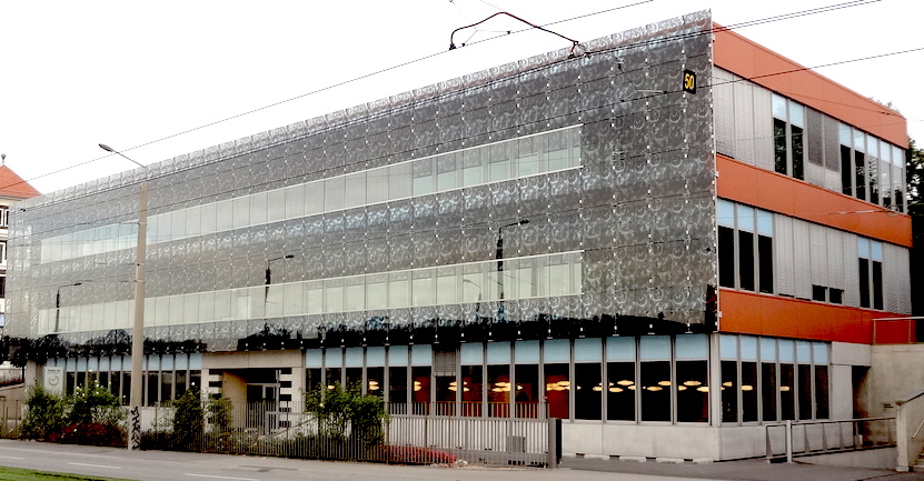 Bâtiment de la société Fiedler, à Carouge, fabriquant des aiguilles de montres.